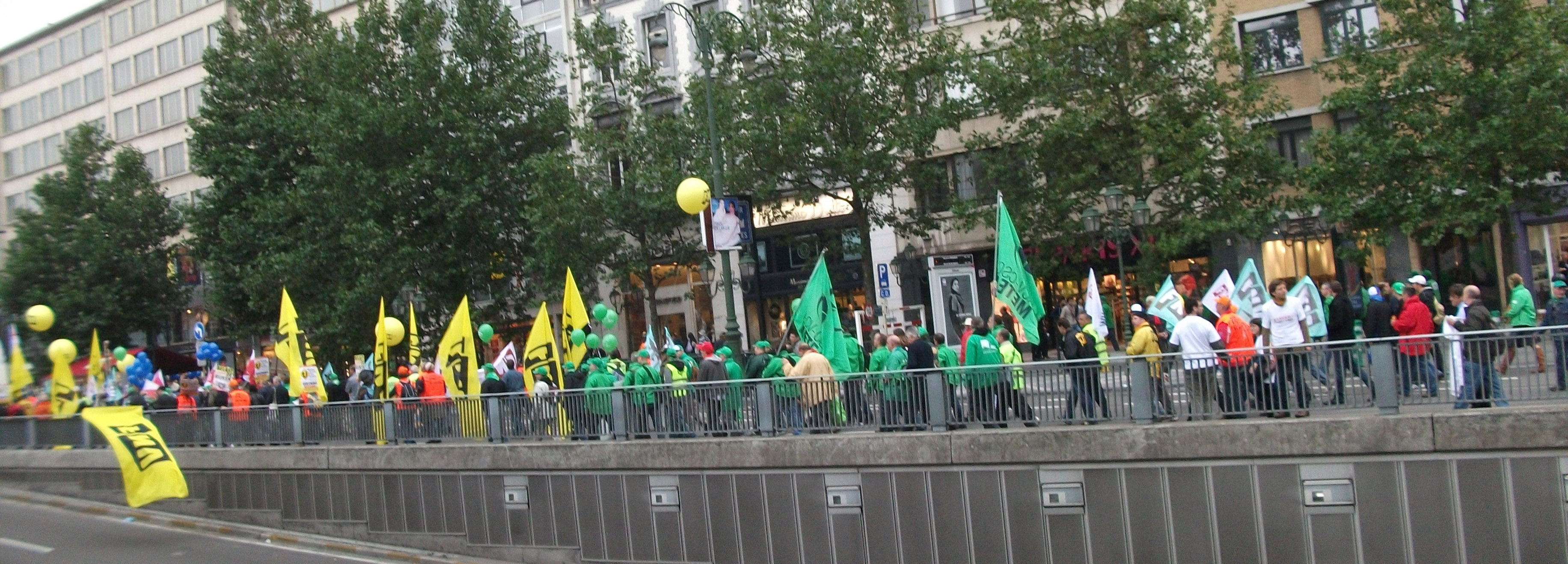 plusieurs syndicats dont le FNV manifestent à Bruxelles en 2010.